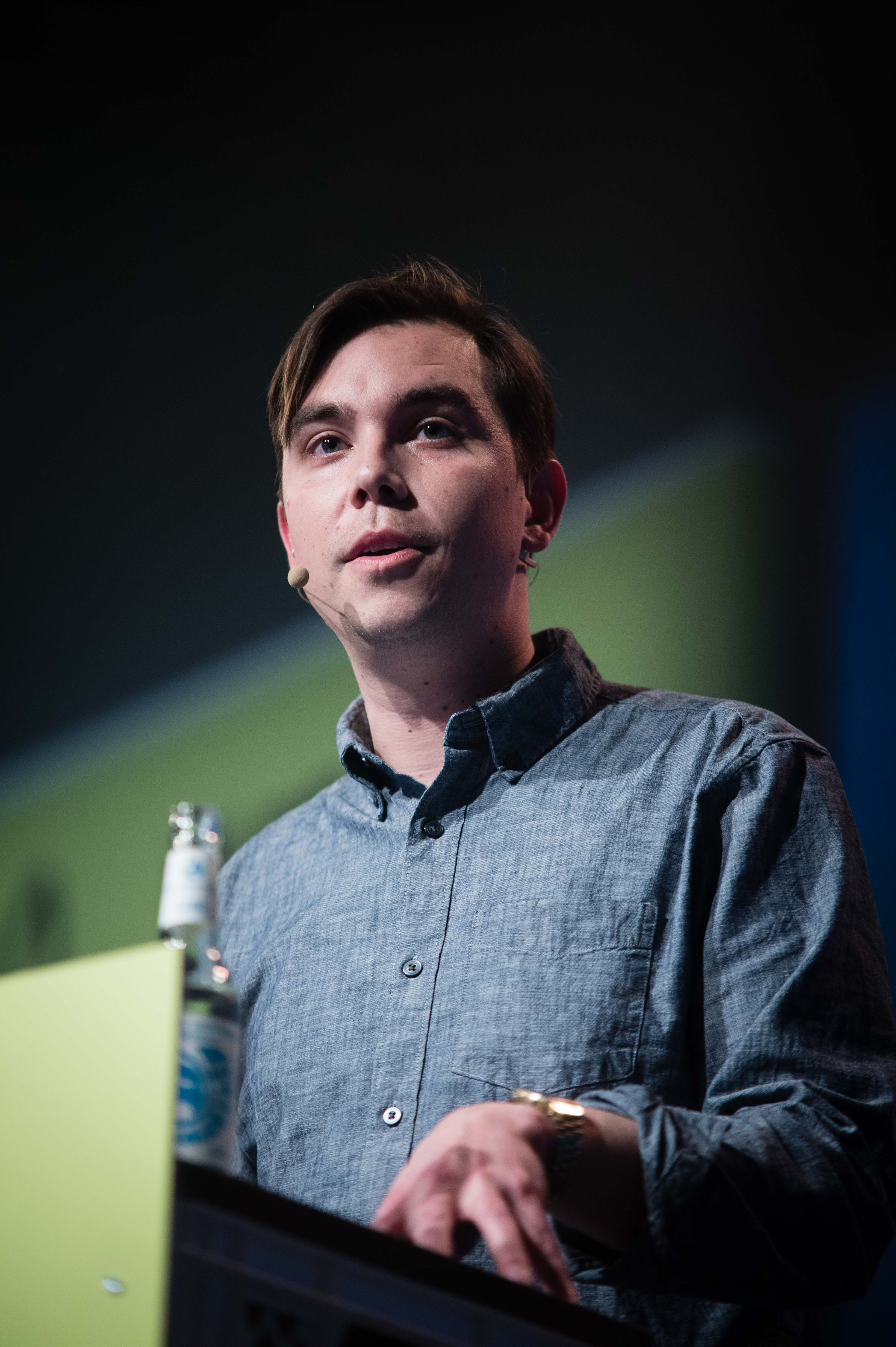 Vortrag James Bridle auf der re:publica 2015 am 05.05.2015 in Berlin. Copyright: re:publica/Gregor Fischer